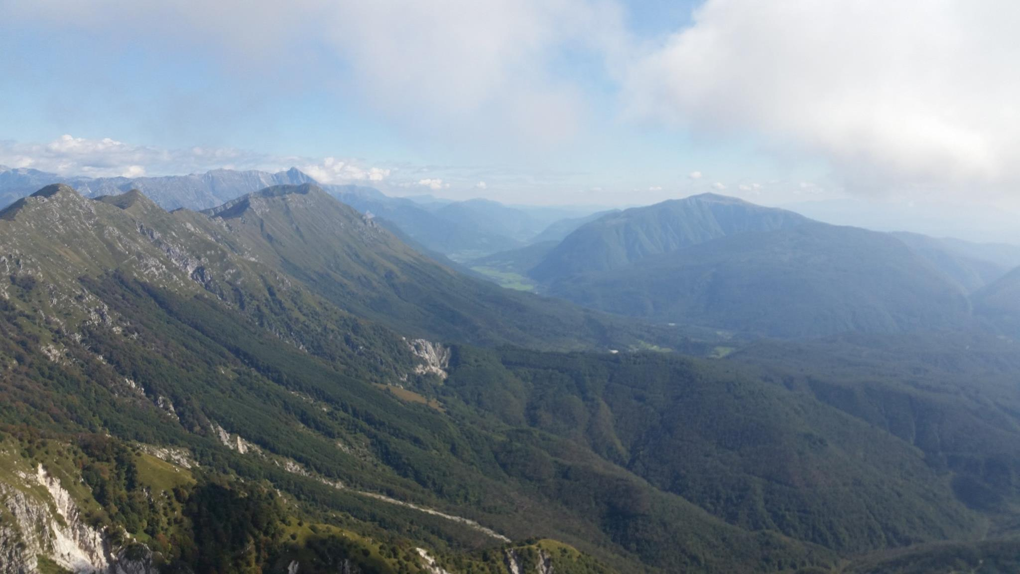 Breginjski kot